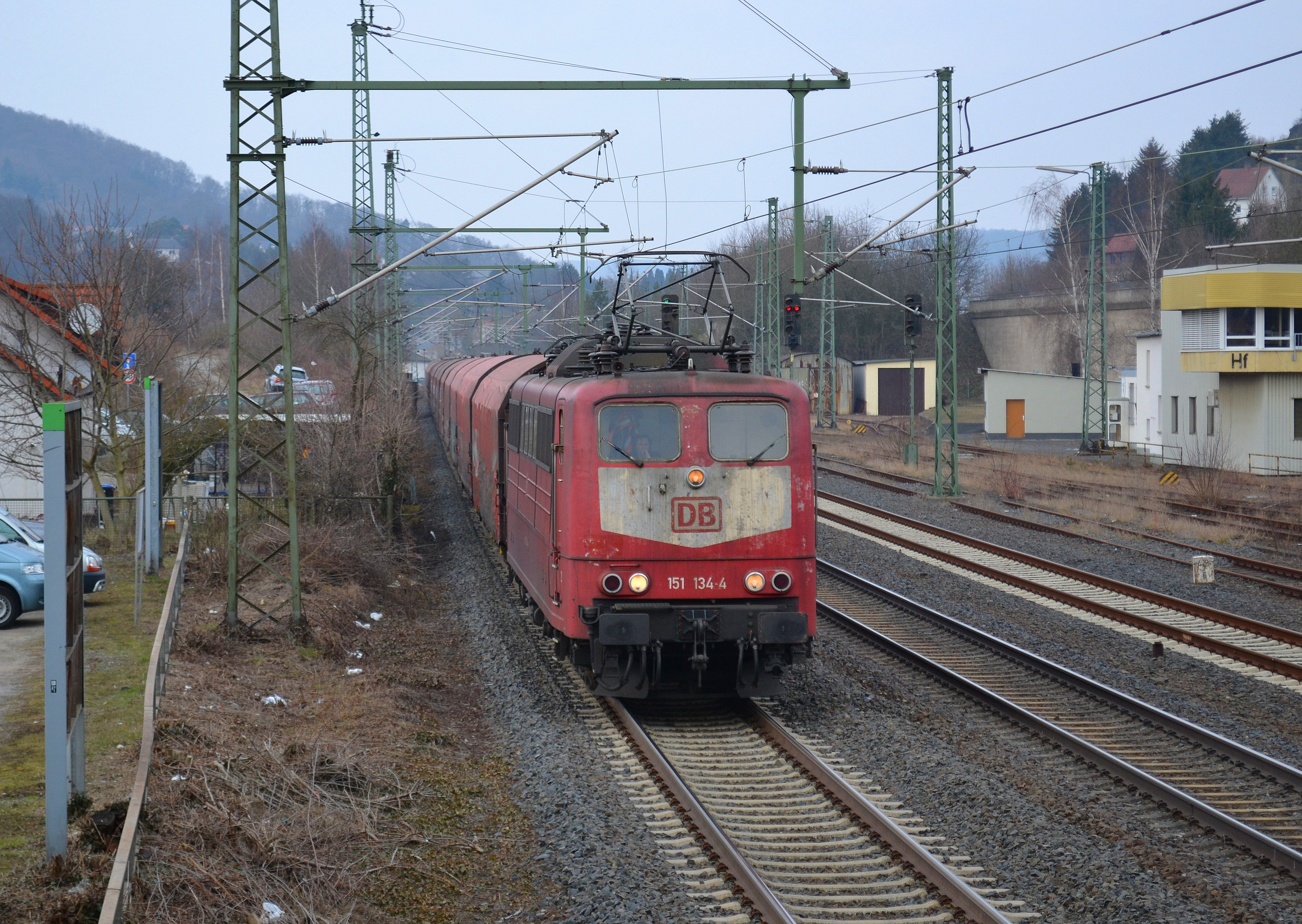 Die orientrote 151 134 mit dem Ganzzug GM 60435 in Herborn (Dillkreis).